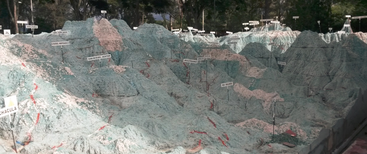 Vista lateral del Mapa en Relieve de Guatemala, 2,014.